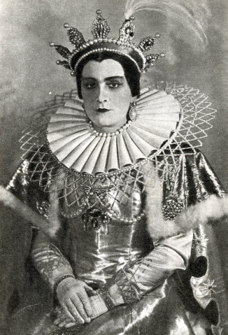 Елена Николаевна Гоголева в роли Марины Мнишек